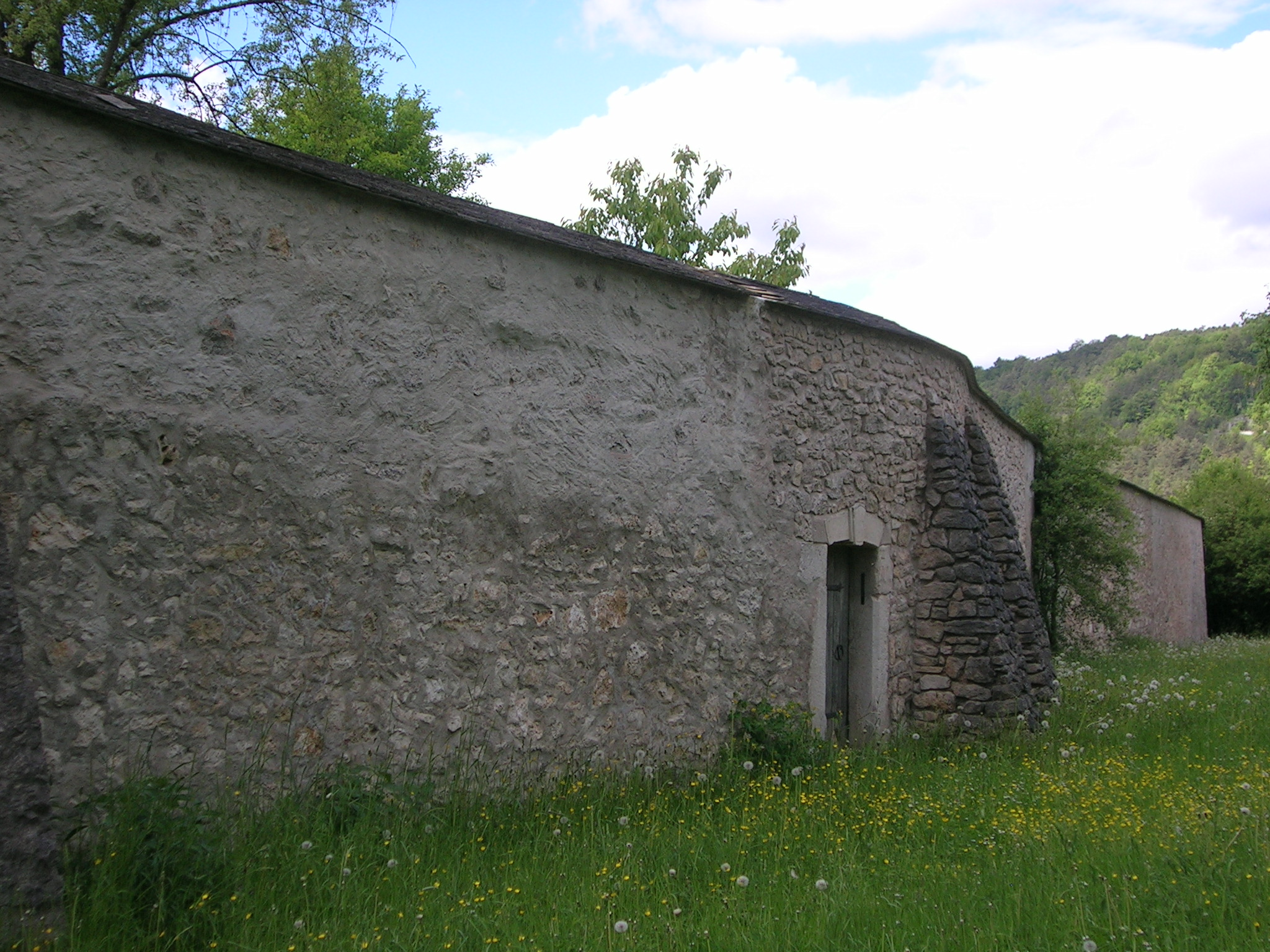 Ehemalige Klostermauer Marienstein; östlicher Mauerzug